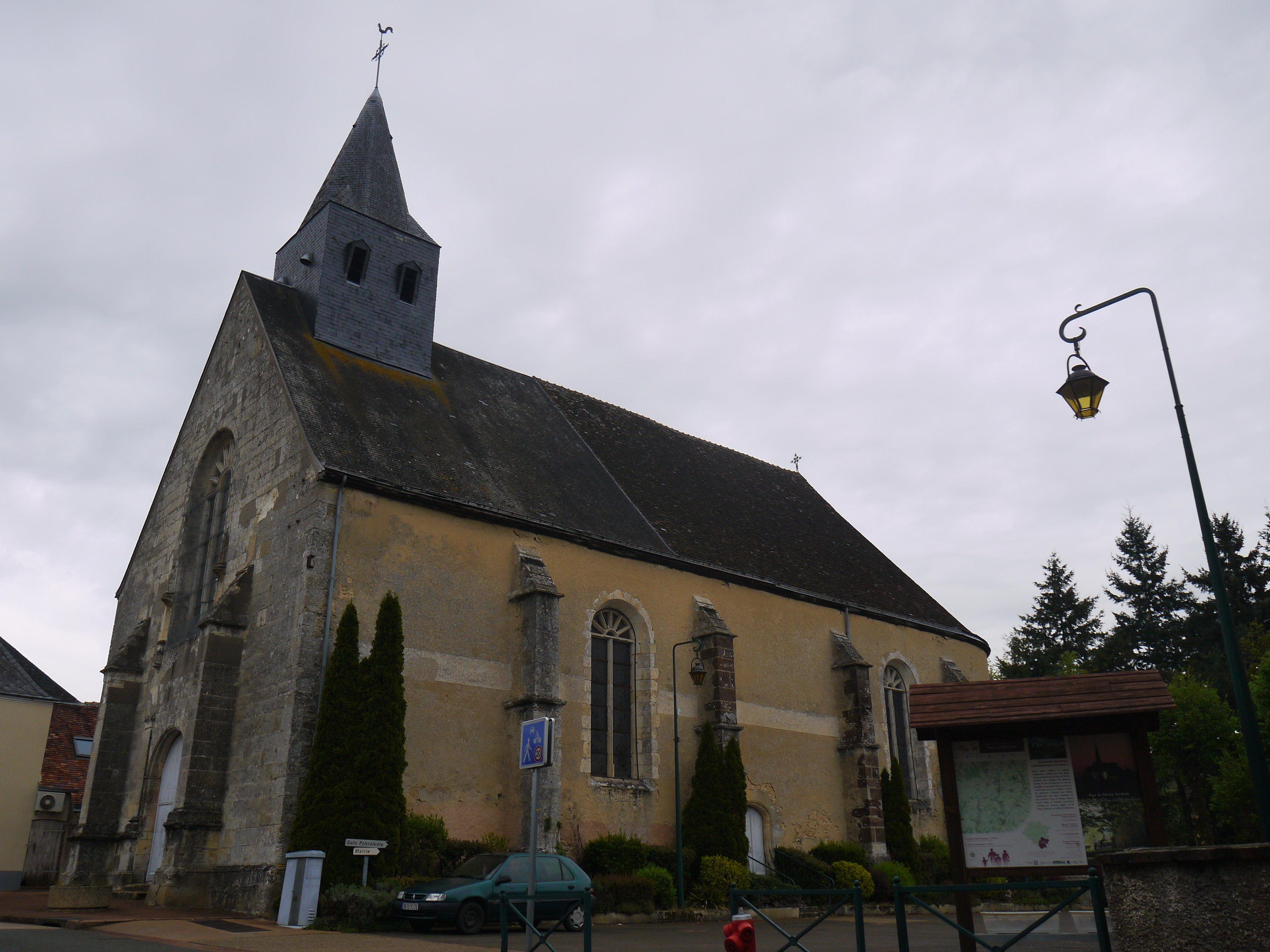 L'église Saint-Maurice.